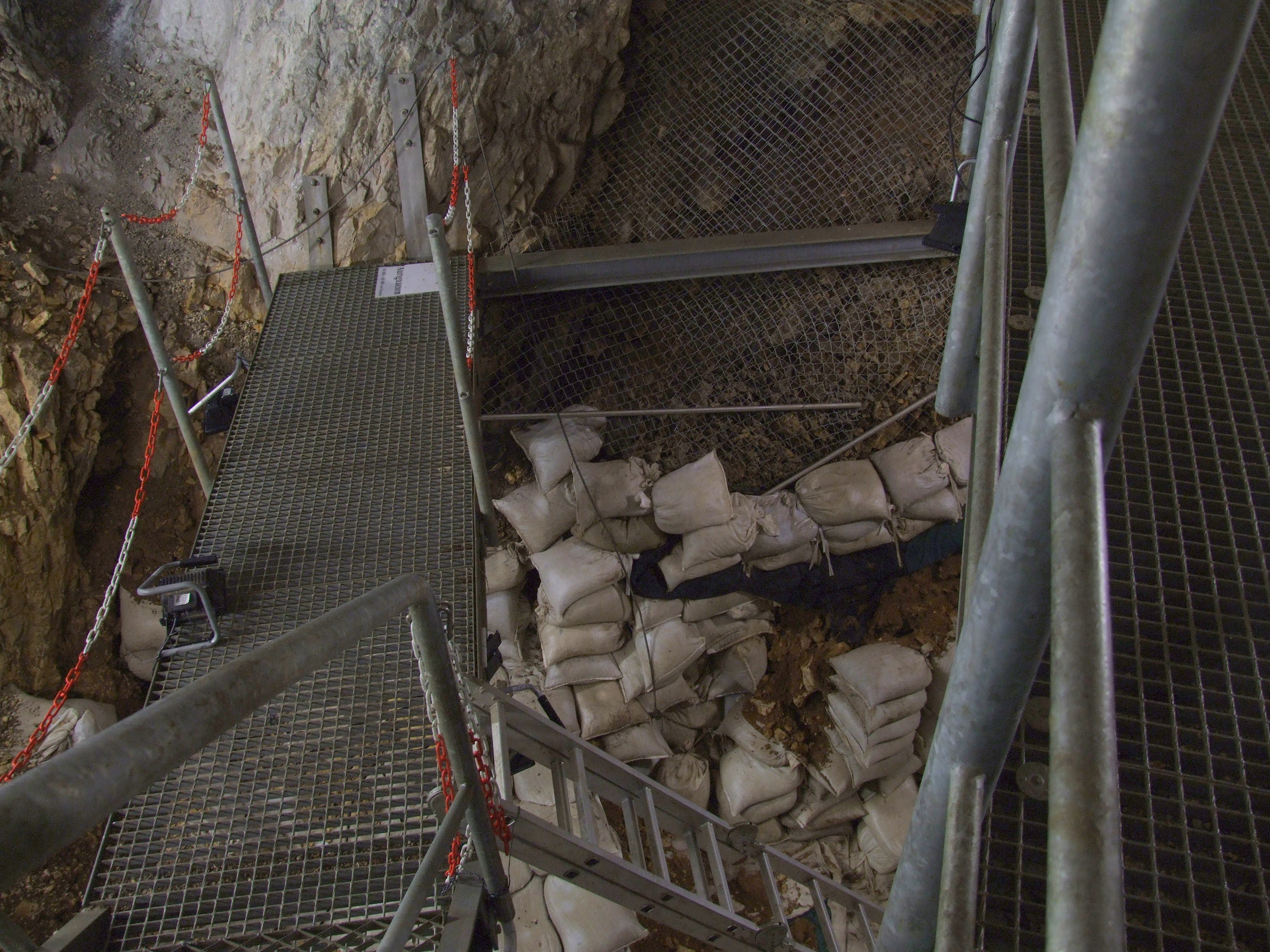 Fundstelle der "Venus vom Hohlen Fels" im vorderen Bereich der Hoehle "Hohler Fels" im Achtal bei Schelklingen, Schwaebische Alb, Sueddeutschland